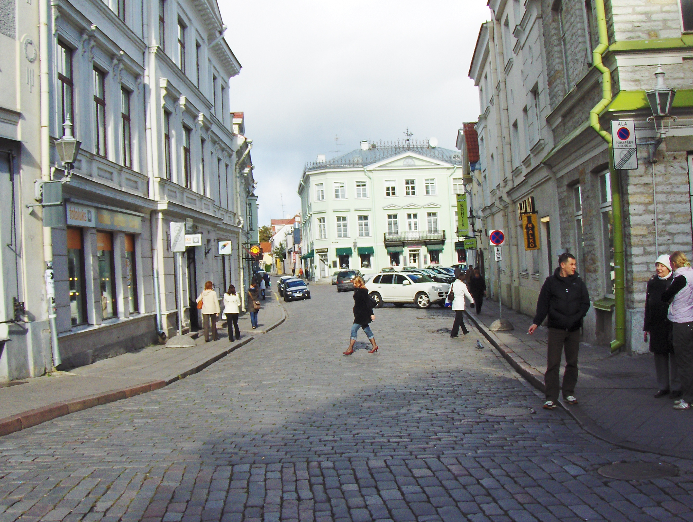 Tallinn